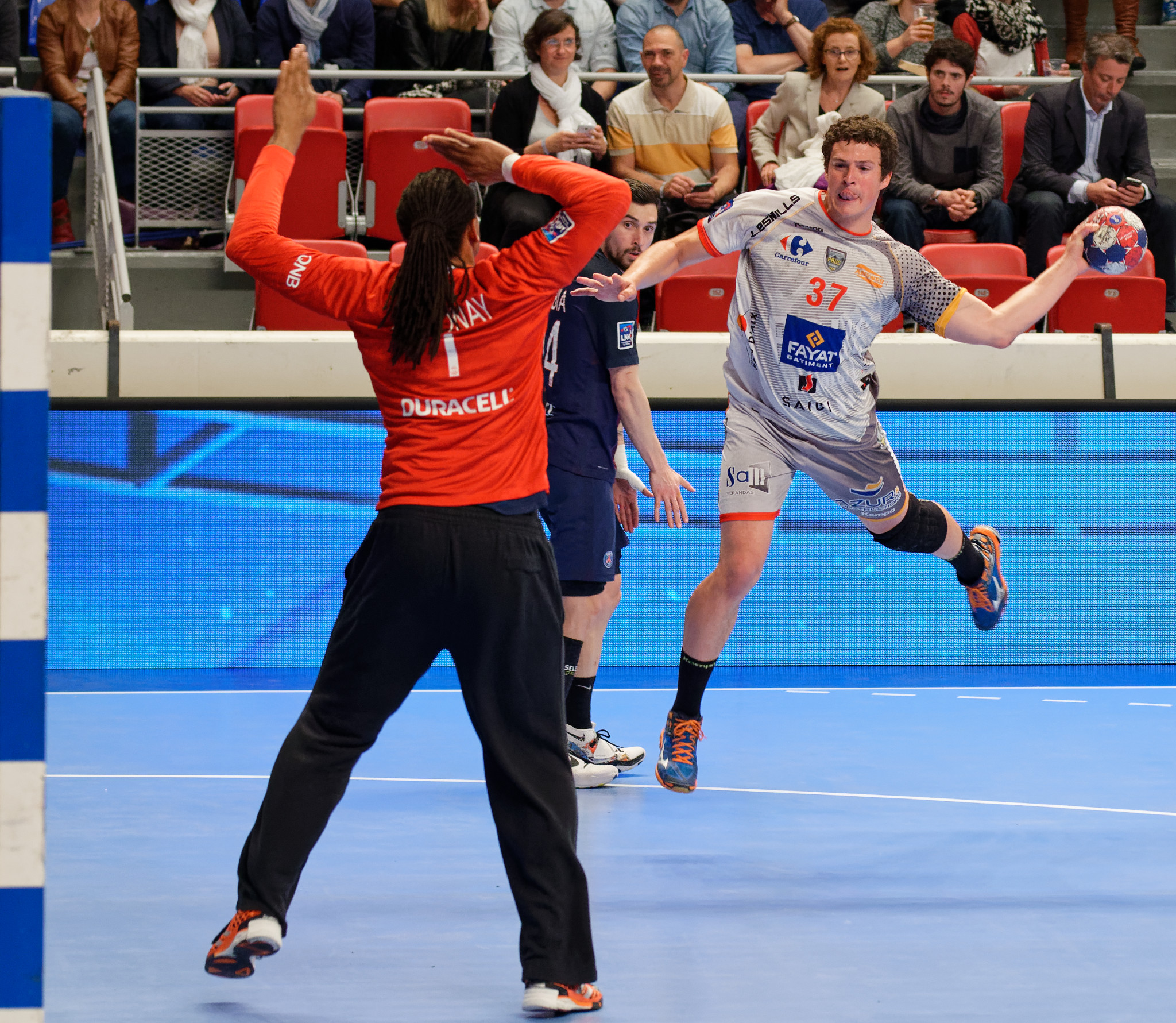 Rencontre de championnat entre le PSG et Pays d'Aix handball. A Coubertin, le 2 juin 2016.